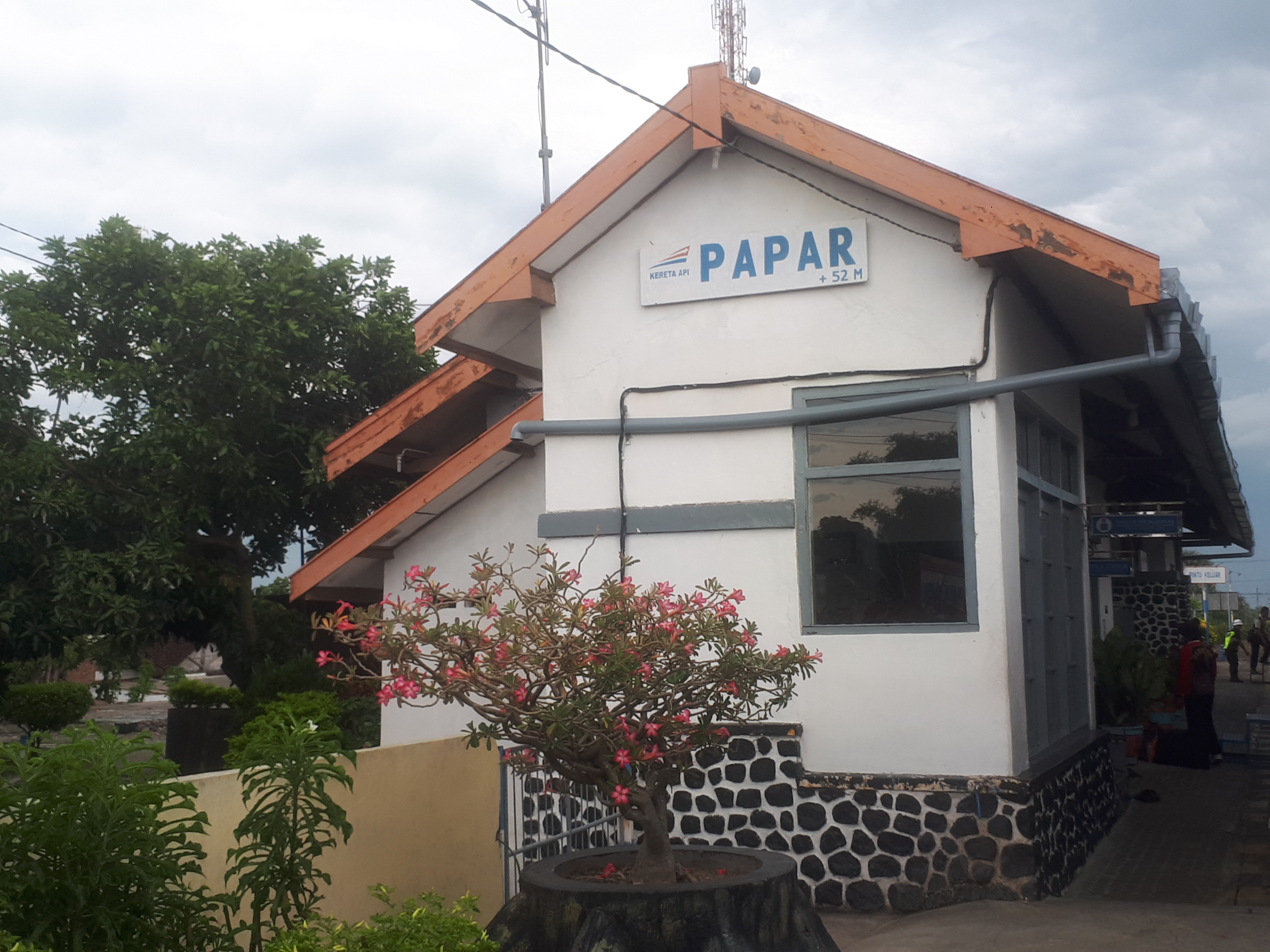 Tampak samping Stasiun Papar pada tahun 2020